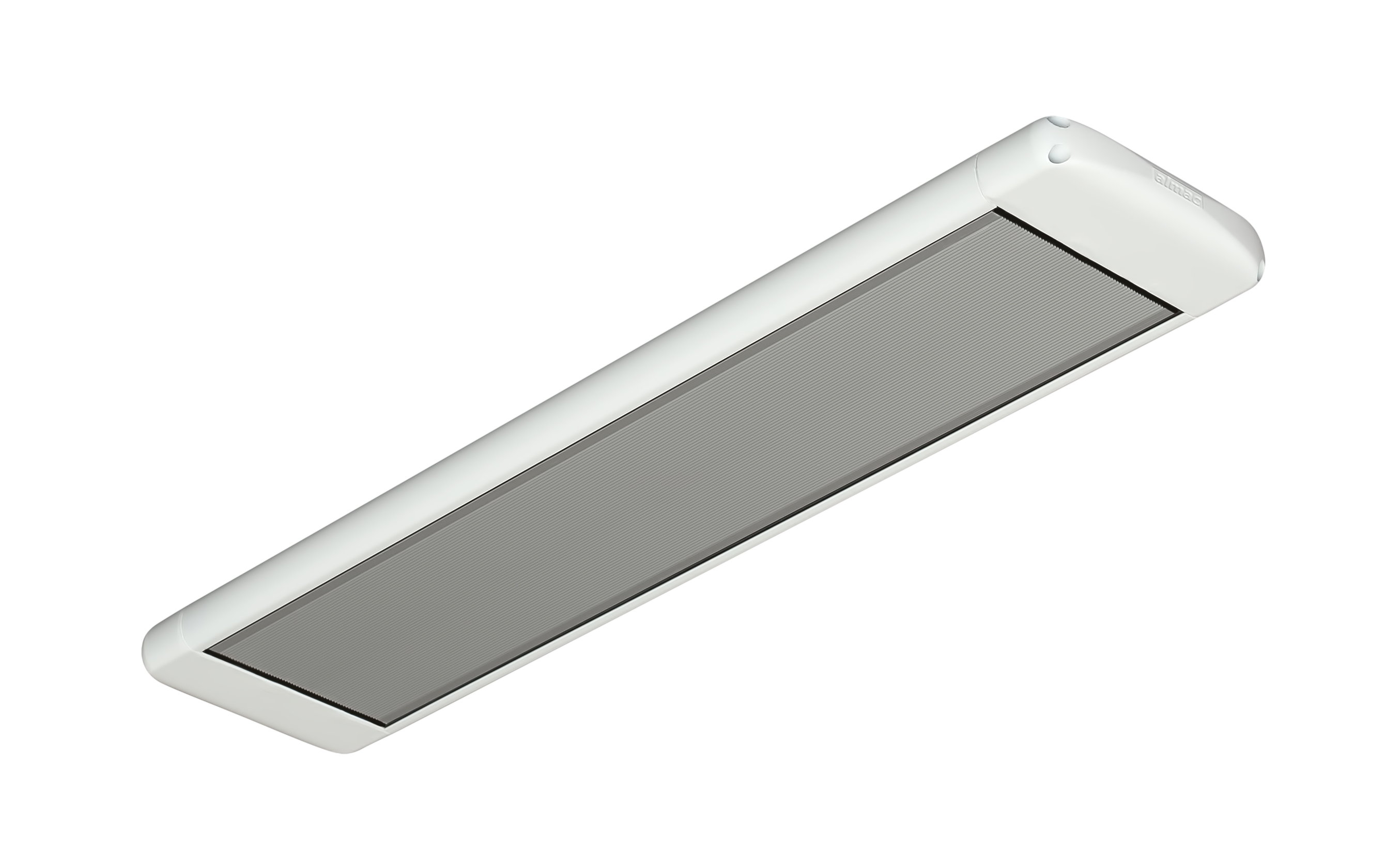 Длинноволновый инфракрасный обогреватель